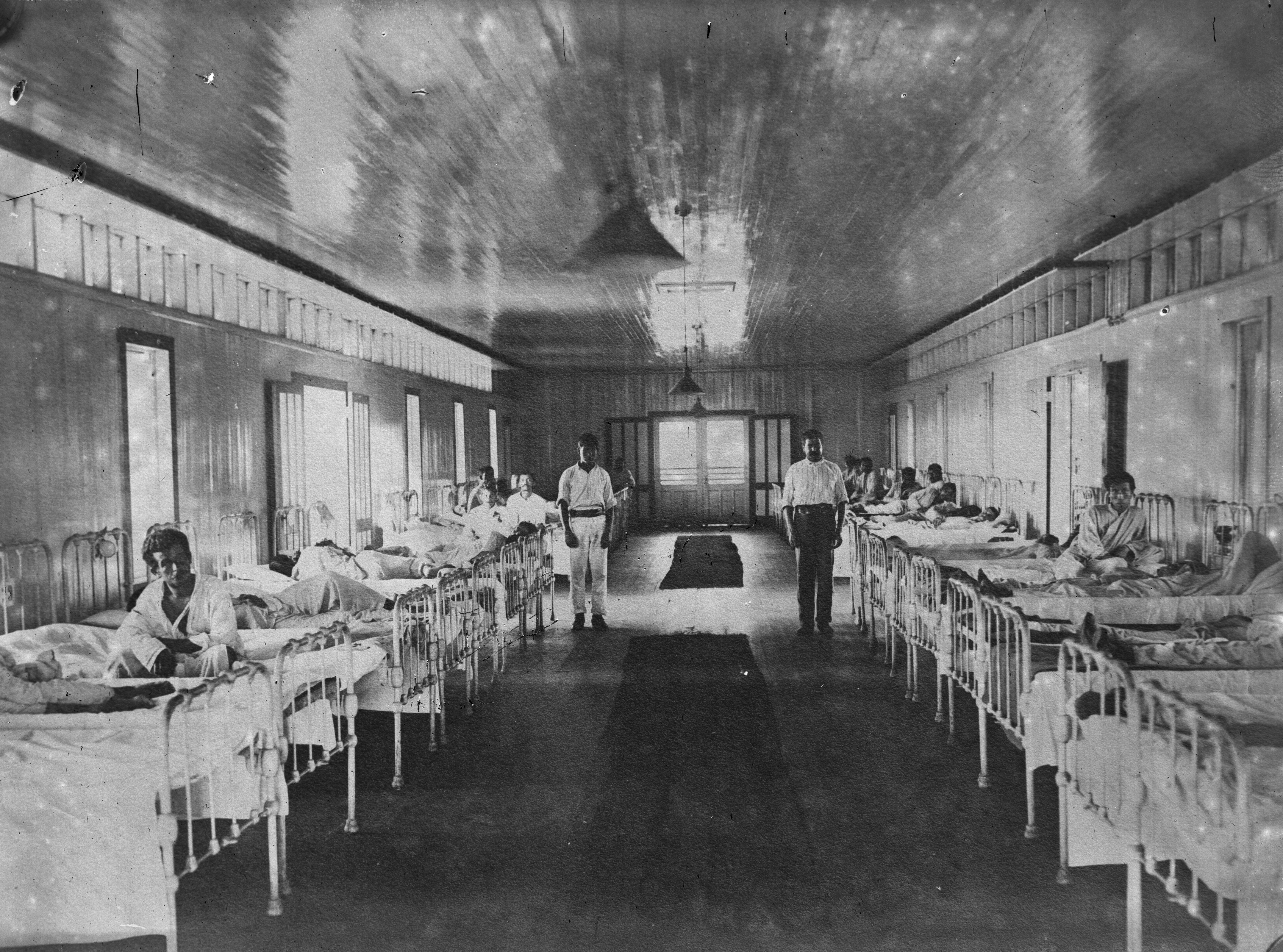 Obra que integra o acervo do Museu Paulista da USP. Coleção Dana Merrill.